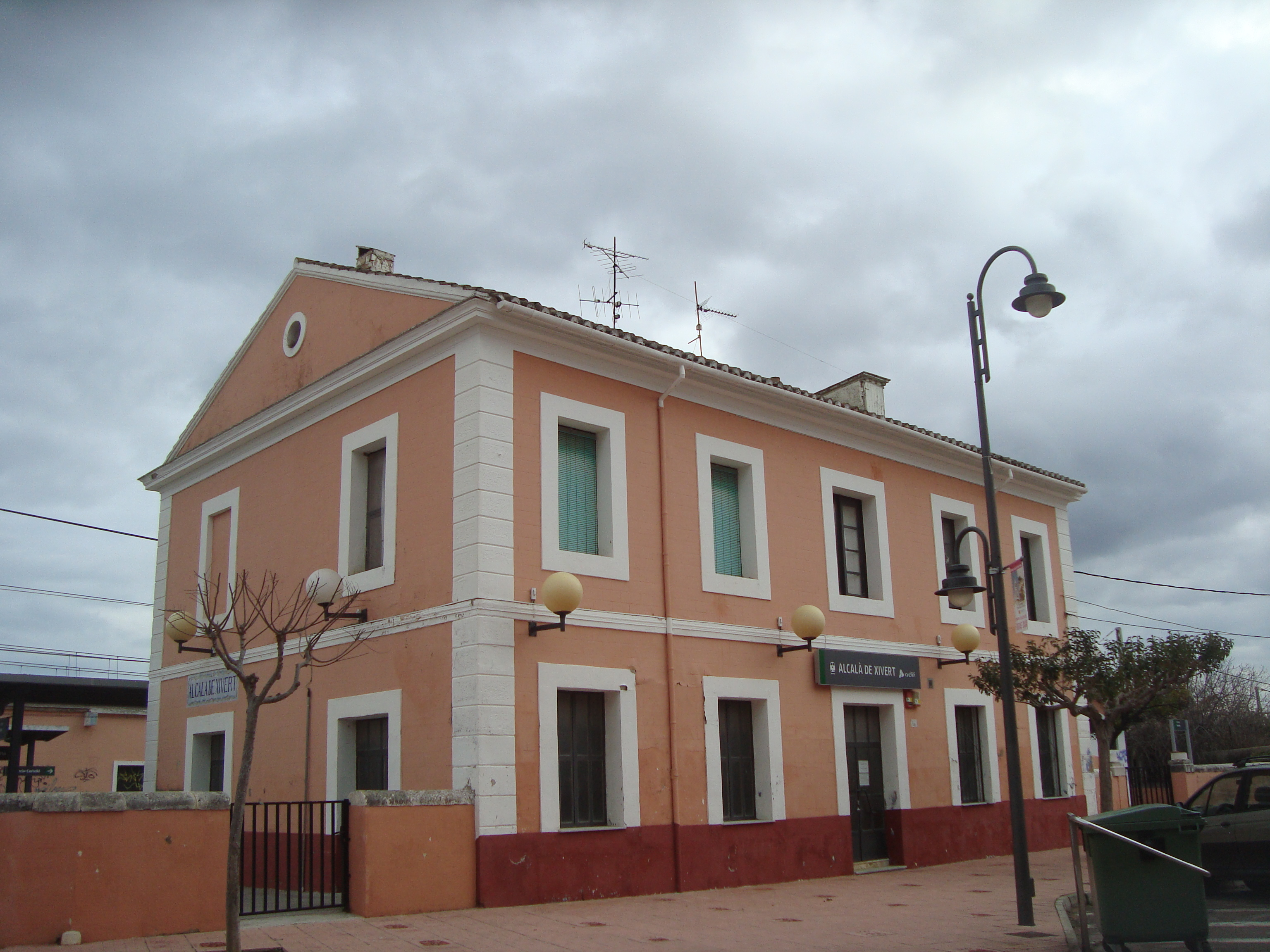 Estació ferroviaría d'Alcalá de Xivert, Castelló